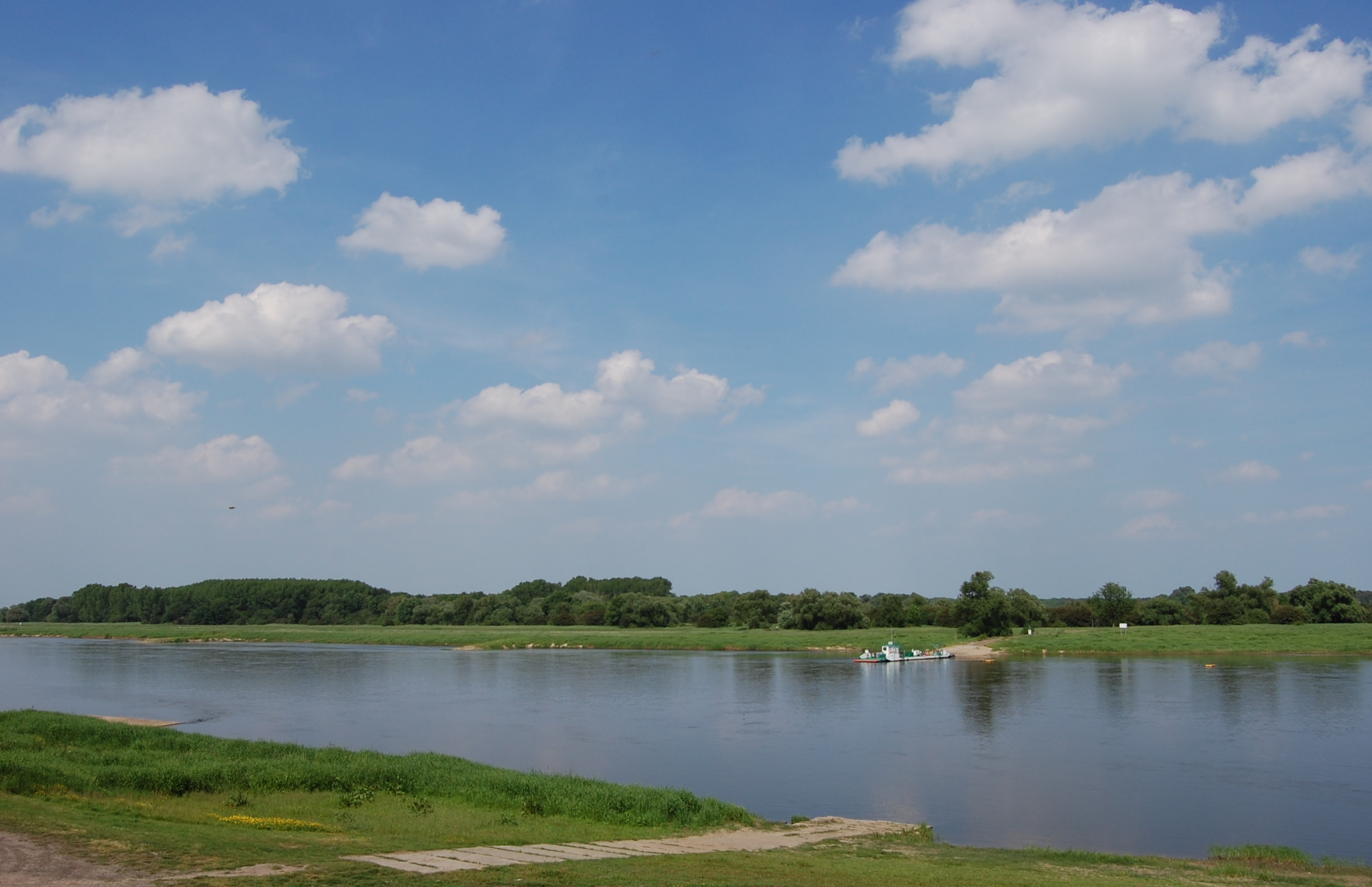 Blick vom Westufer der Elbe auf die Fähre Westerhüsen